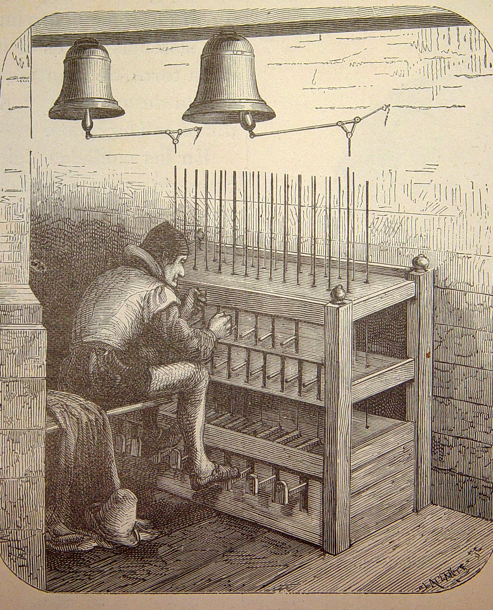 "Antiguo juego de campanas : mecanismo primitivo". Ilustraciones pertenecientes al libro : El mundo físico : gravedad, gravitación, luz, calor, electricidad, magnetismo, etc. / A. Guillemin. - Barcelona Montaner y Simón, 1882